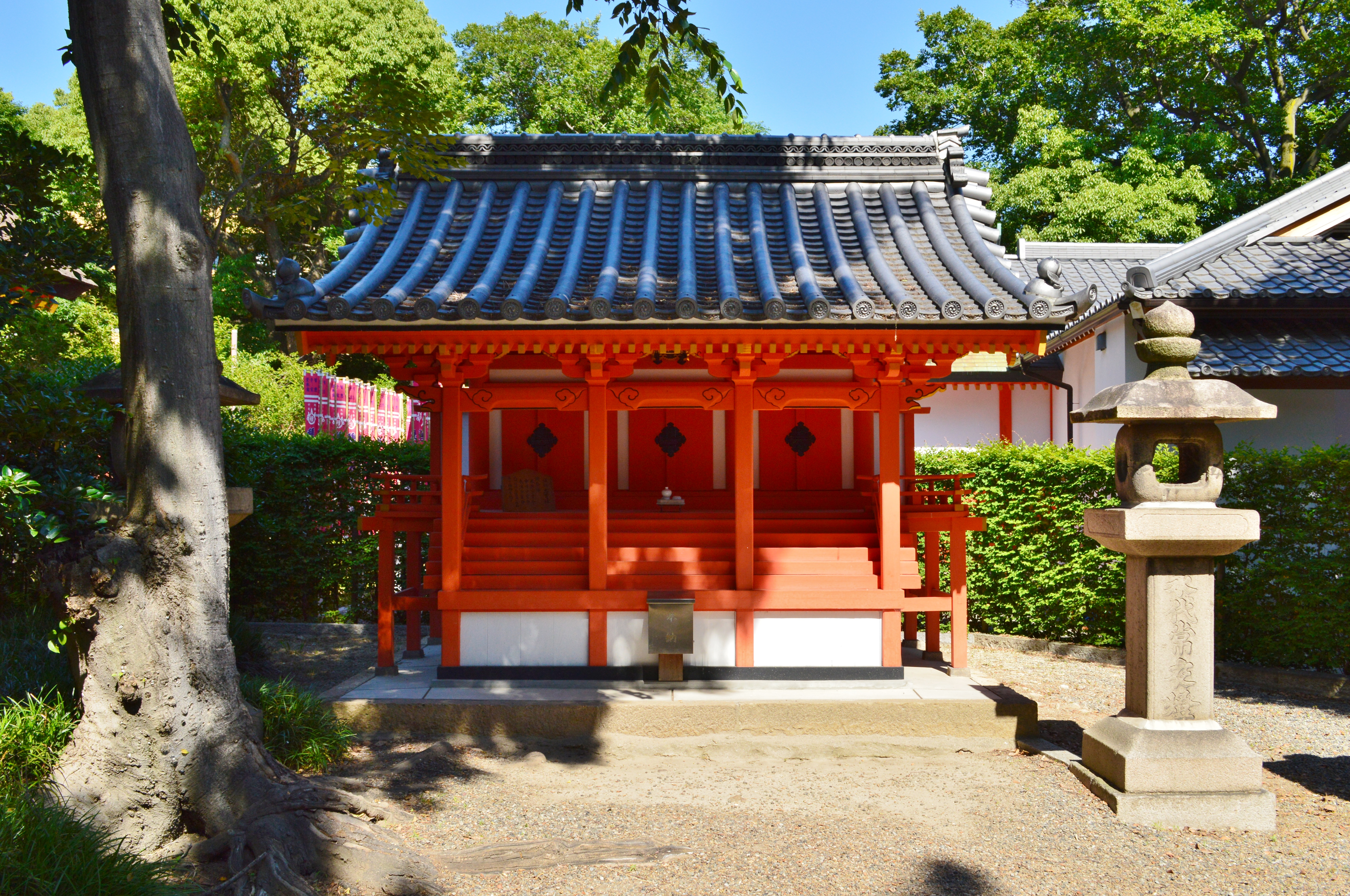 住吉大社境内摂社 志賀神社